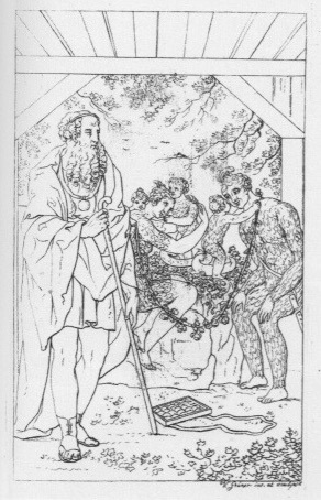 Motiv aus Goethes "Der Zauberflöte zweiter Teil": Sarastro mit Papageno und Papagena